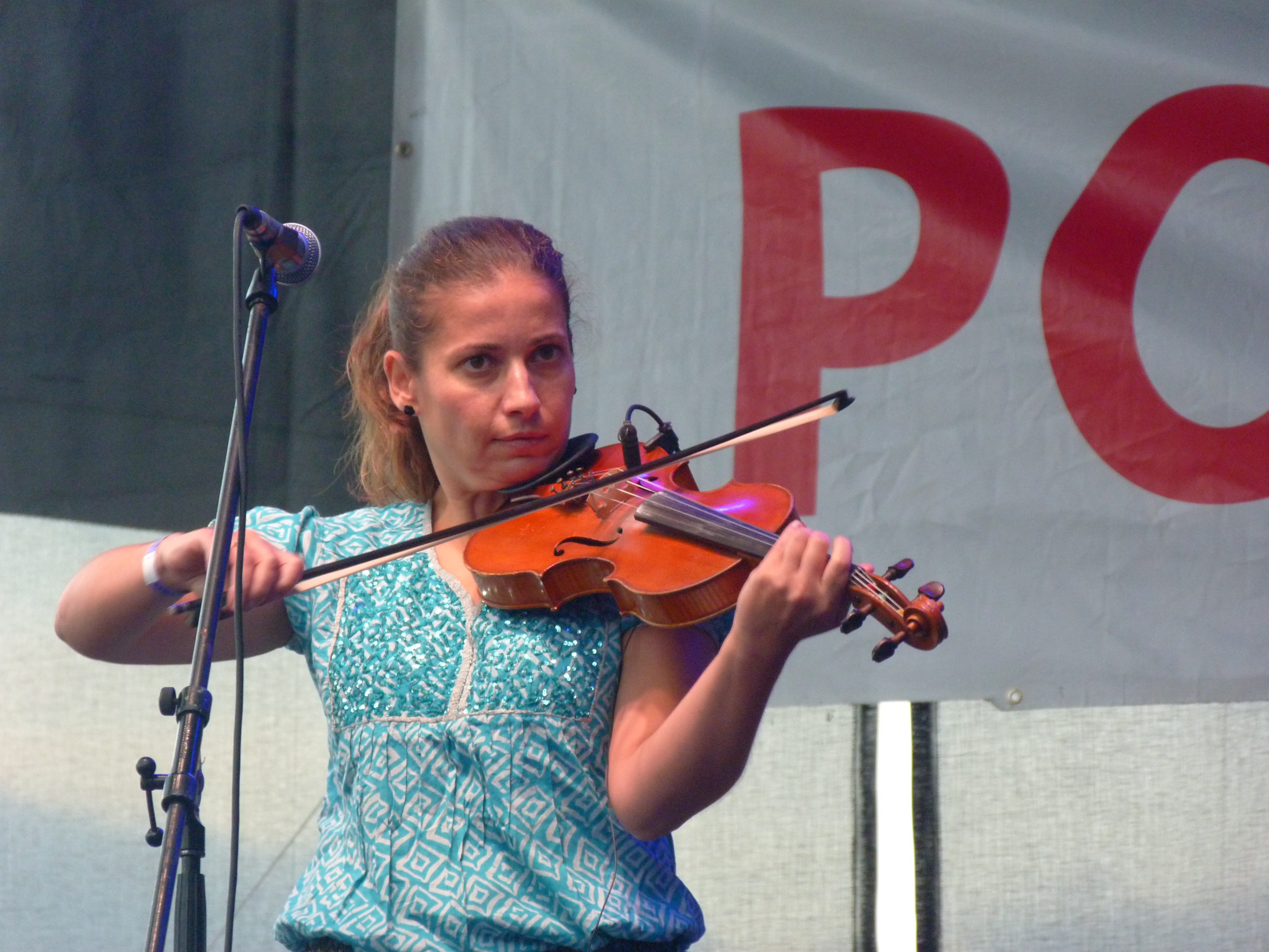 A felvétel 2014. szeptember 12-én, pénteken készült Budapesten, a 23. Budavári Borfesztiválon. Nagyszínpad, a Makám együttes és vendégei. Az együttes tagjai: Krulik Zoltán - gitár Korzenszky Klára - ének Kuczera Barbara – hegedű, vokál Boros Attila - basszusgitár Eredics Dávid - fúvós hangszerek Keönch László - ütőhangszerek Mohai György - hangmérnök ( Szalóki Ágnes, Lovász Irén. Bognár Szilvia: Katona sirató KATONA SIRATÓ MAKÁM BOGNÁR SZILVIA MIHI 2014 Források Bor és Pia borpiaci szakmai magazin 2014. augusztus Borfesztivál Melléklet 23. Budavári Borfesztivál kiállítási tájékoztató ©© Derzsi Elekes Andor, Budapest, 2014, A kép és filmfelvételek egészben, vagy részletekben másolását, bármilyen úton történő sokszorosítását és felhasználását a szerző ellenérték nélkül, jogutódjaira is kihatóan megengedi. Az engedély kiterjed a kereskedelmi célú hasznosításra is. Kéri azonban nevének feltüntetését a felhasználás során. A Metapolisz sorozat valamennyi képe és filmje Creative Commons alatti valamint kereskedelmi - for profit - célra is felhasználható. Ajánlott hivatkozás: Derzsi Elekes Andor: Metapolisz DVD line